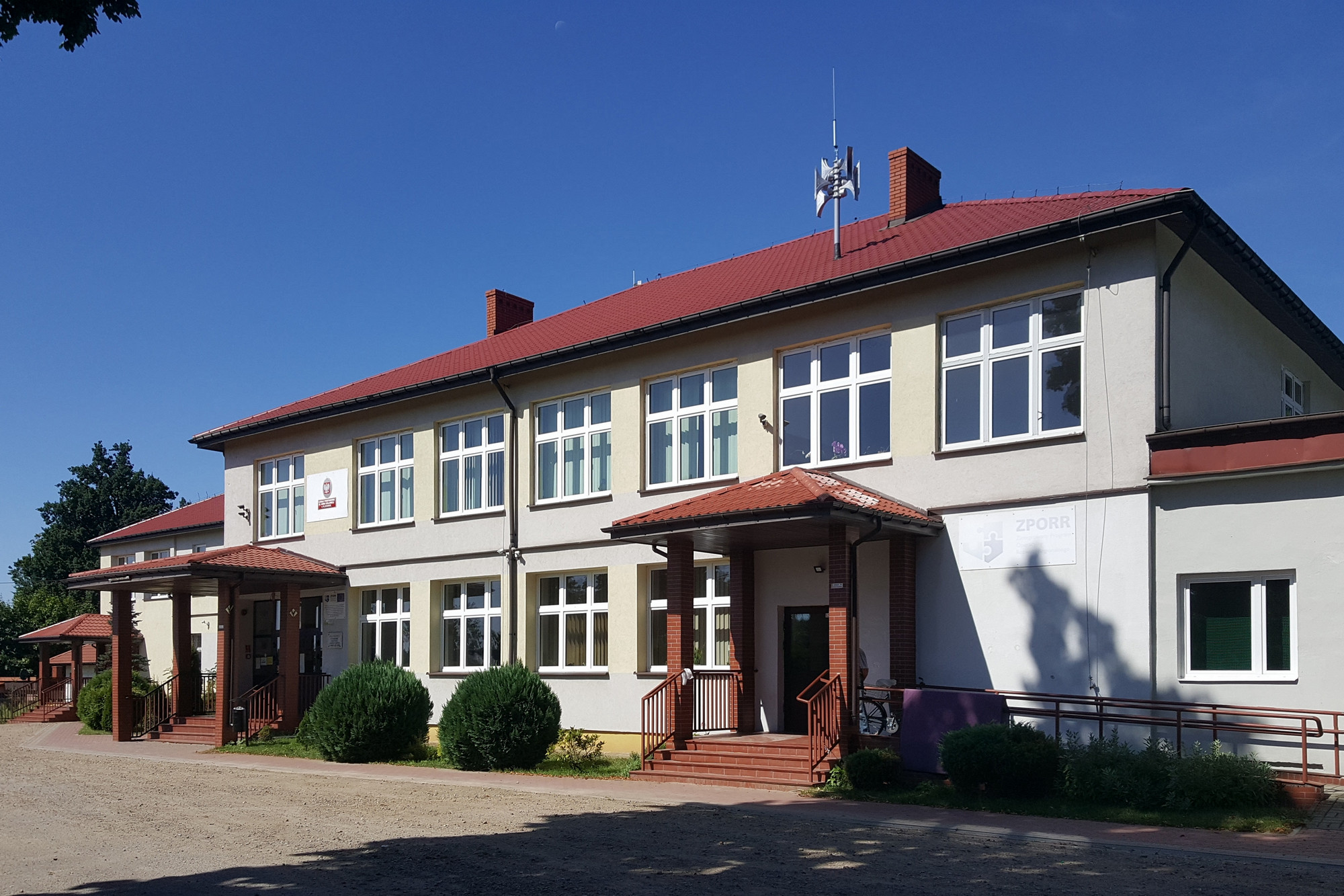 Blichowo - Szkoła Podstawowa im. Armii Krajowej.